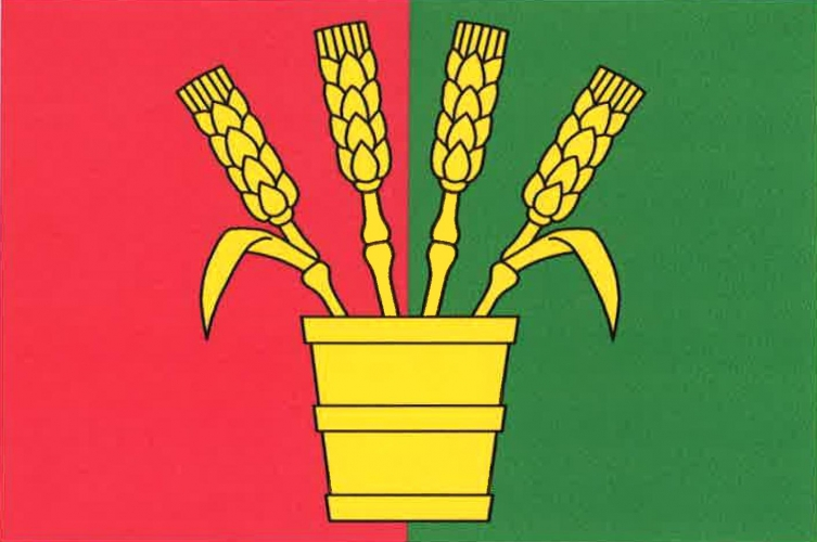 vlajka, Chabeřice, okres Kutná Hora